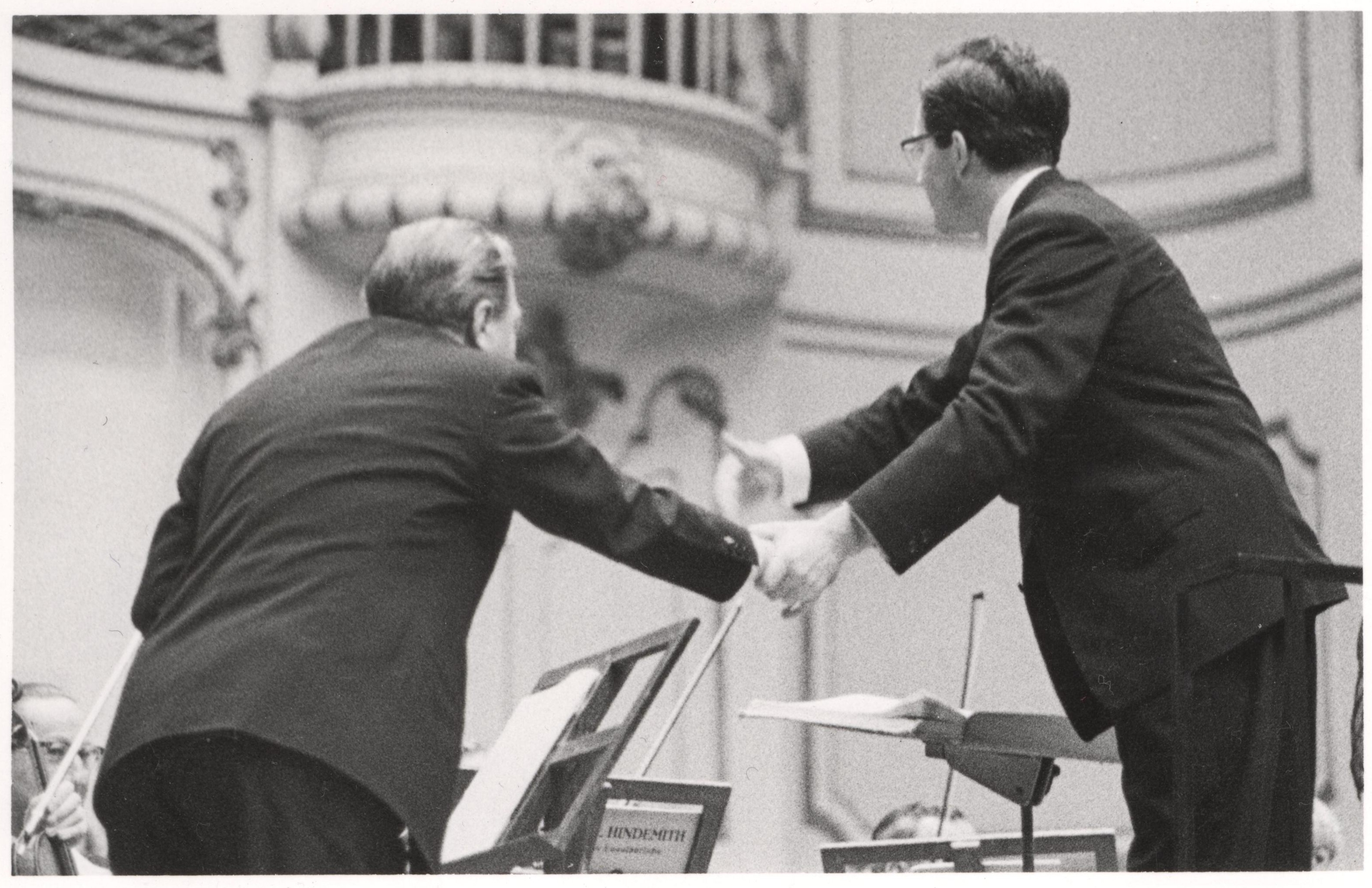 1960: Wolfgang Sawallisch dankt dem Philharmonischen Staatsorchester Hamburg nach dem Konzert in der Hamburger Musikhalle